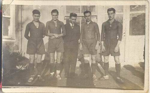 Balıkesir İdmangücü futbolcuları.